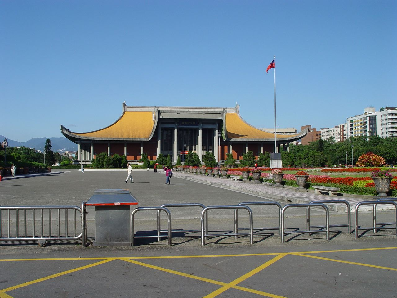 臺北市國父紀念館，阿仁（seasurfer）拍攝。